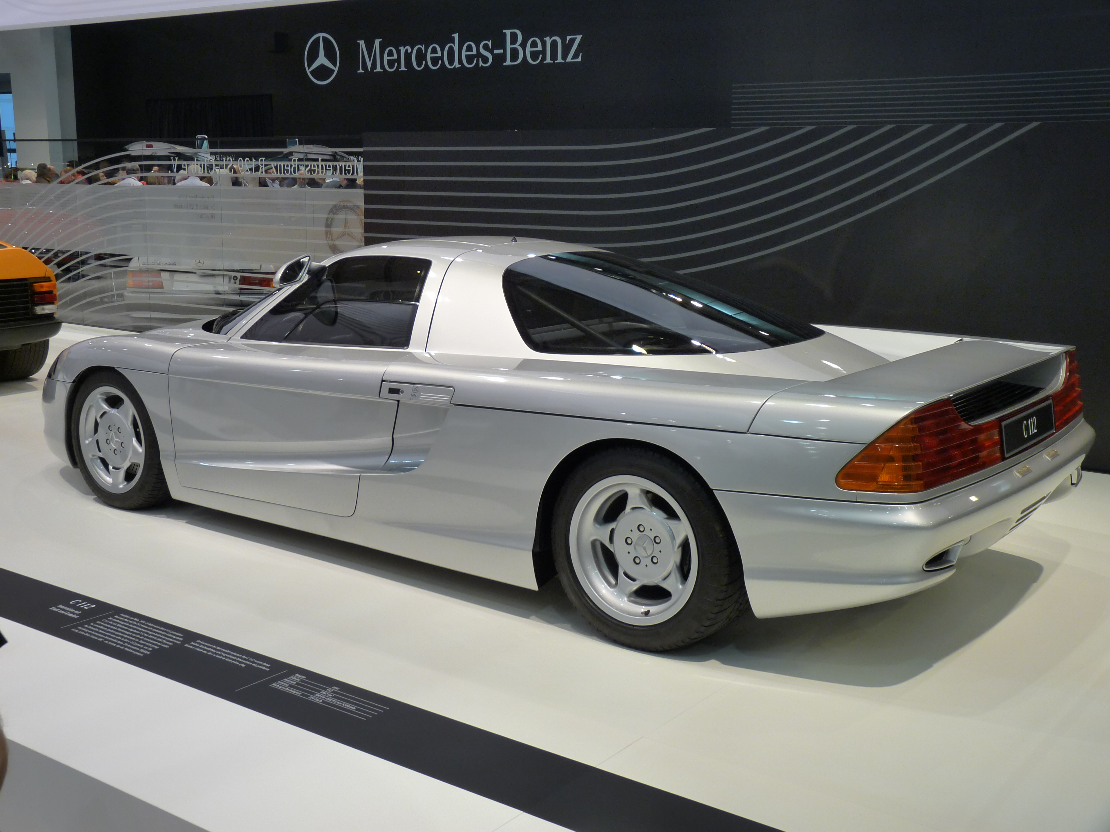 description see filename